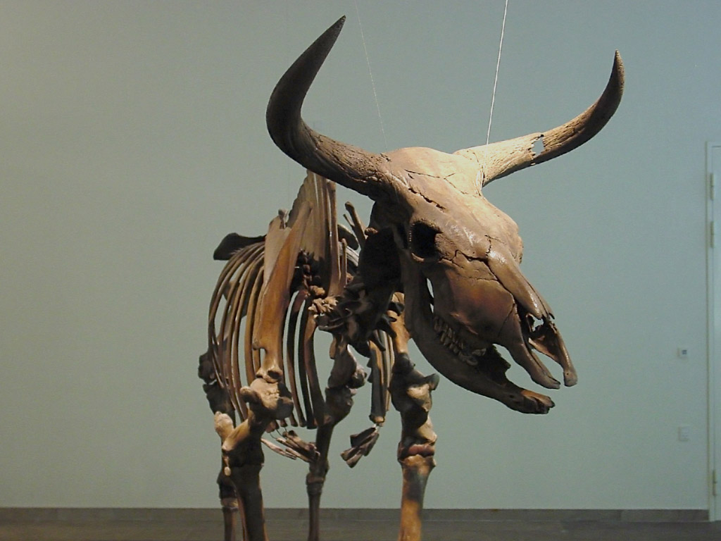 Scheletro di Alce